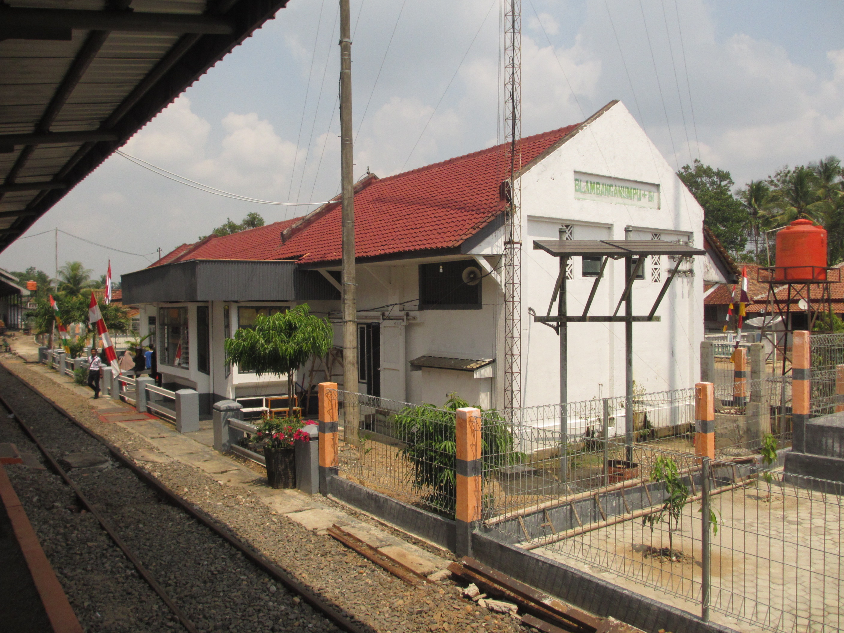 Stasiun Blambanganumpu.